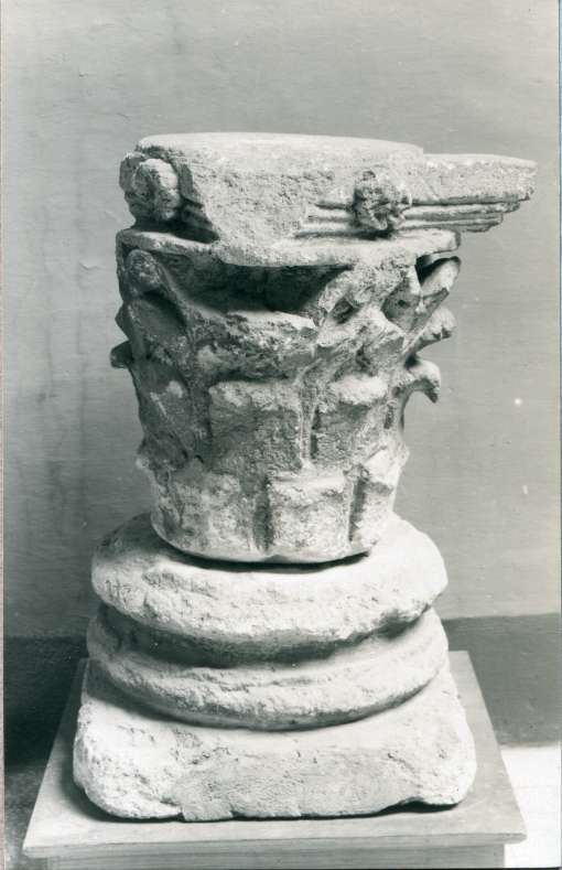 Capitell d'ordre corinti a base àtica d'una columna romana del segle III dC., trobada a la part urbana de la vil·la romana de Darró (Vilanova i la Geltrú, Barcelona)